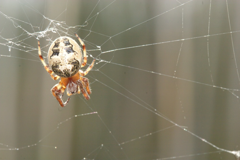 Epeire des roseaux Larinioides cornutus